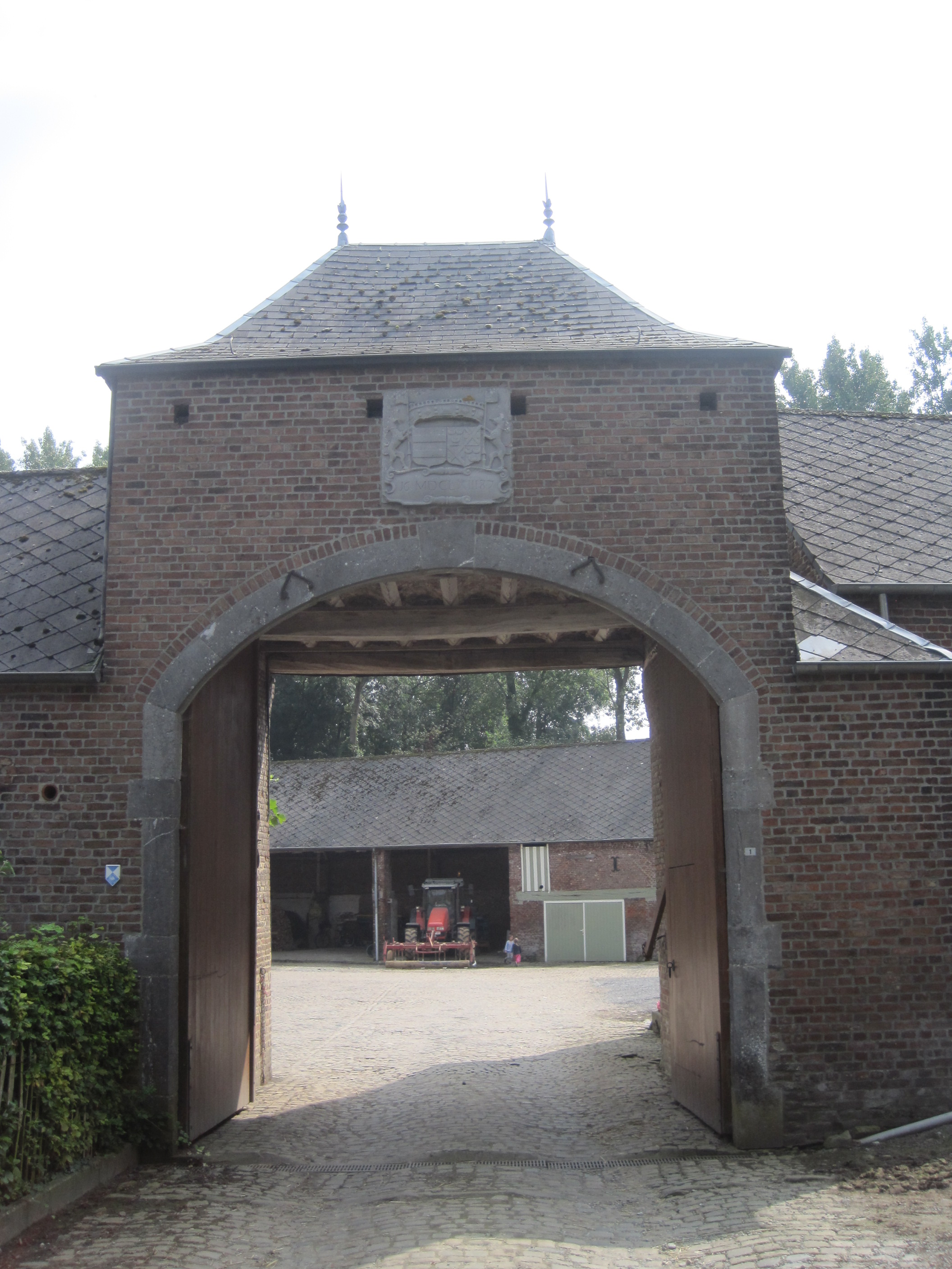 La totalité de la Grange sis rue du Gros chêne, n°1 à Liernu (M) ainsi que l'ensemble formé par celle-ci et les terrains environnants (S)